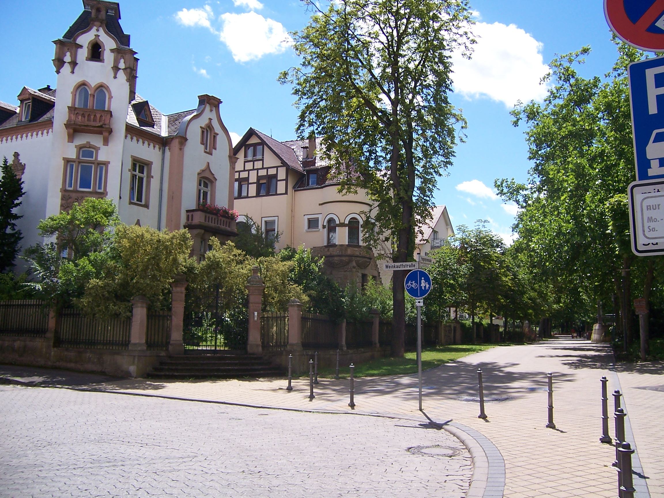 Beginn der Priegerpromenade entlang der Nahe in Bad Kreuznach